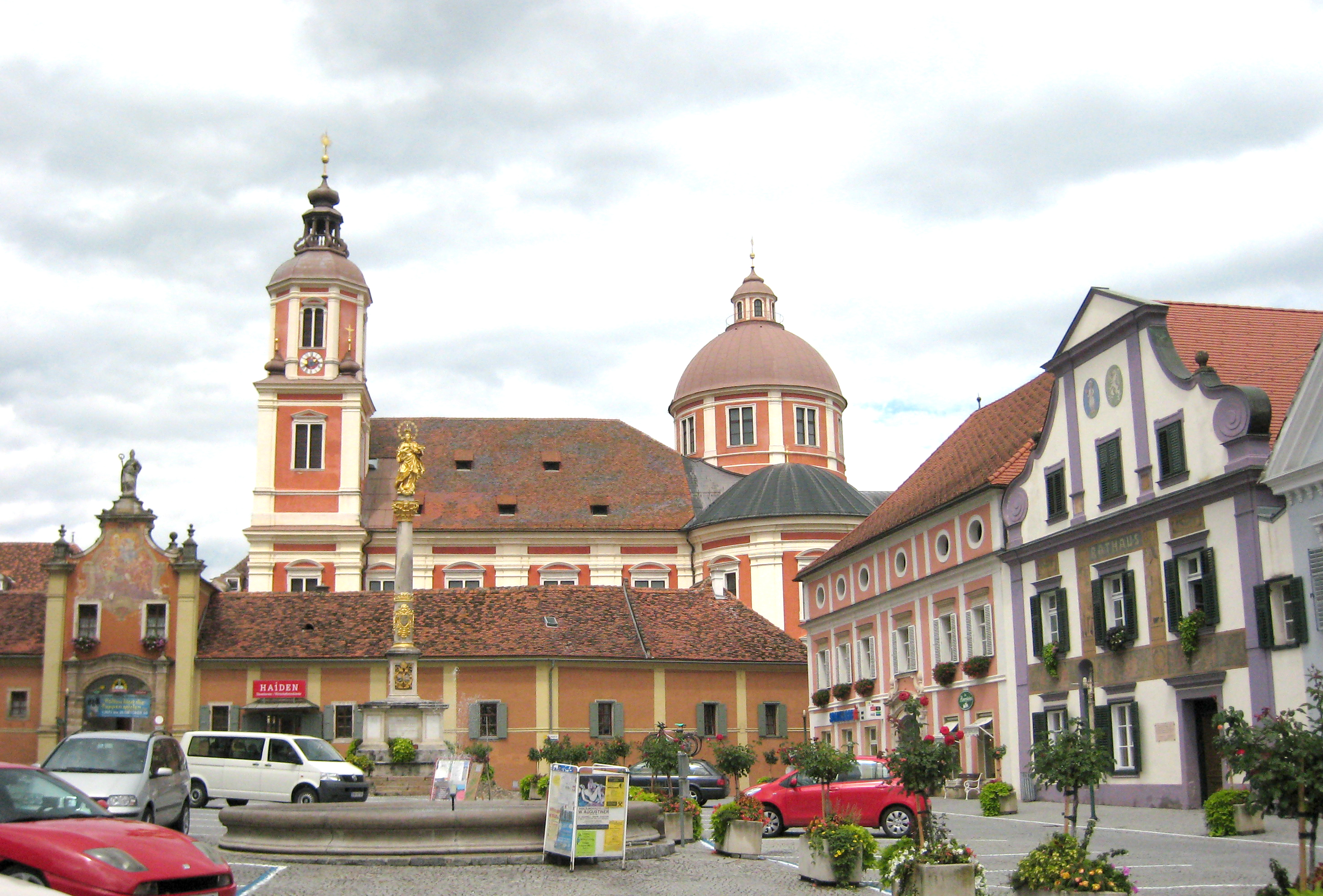 Das ehem. Augustiner-Chorherrenstift, das Rathaus und der Brunnen Augustiner-Chorherrenstift: Rathaus: Brunnen: Mariensäule